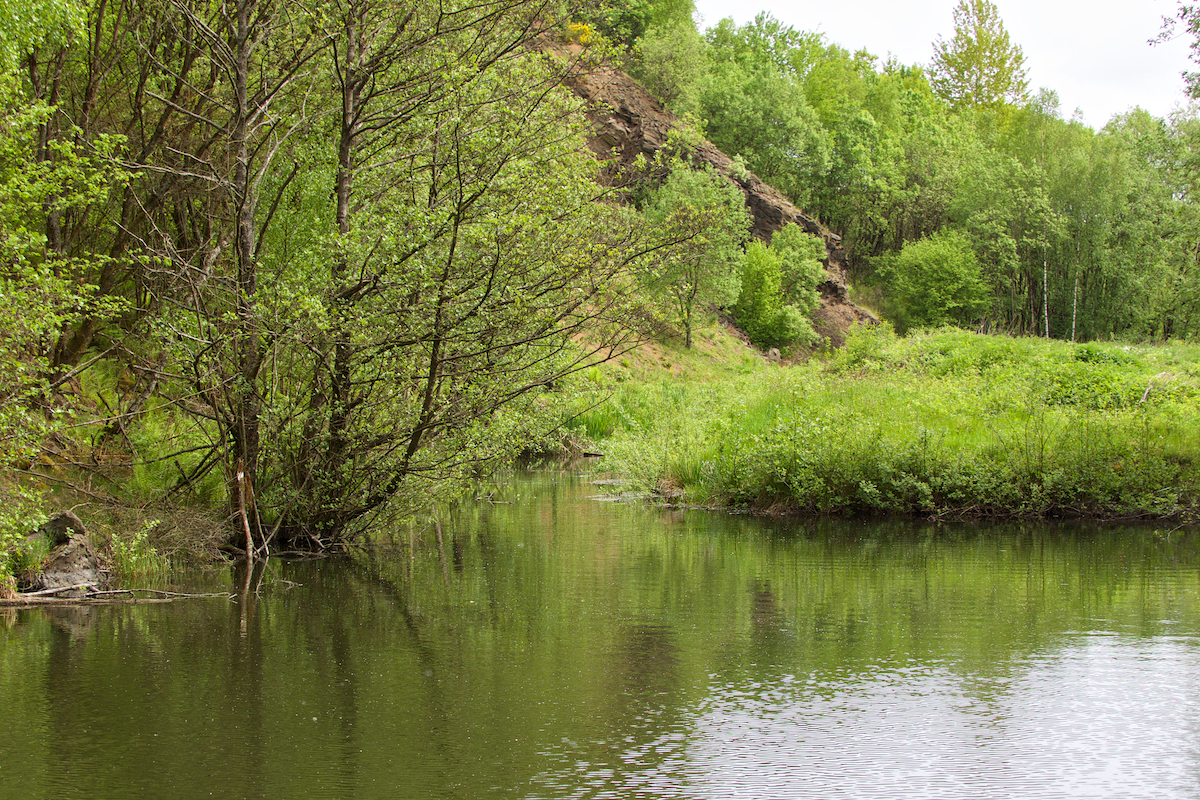 (NSG:RP-7132-021)_Steinbruch Hasselichskopf